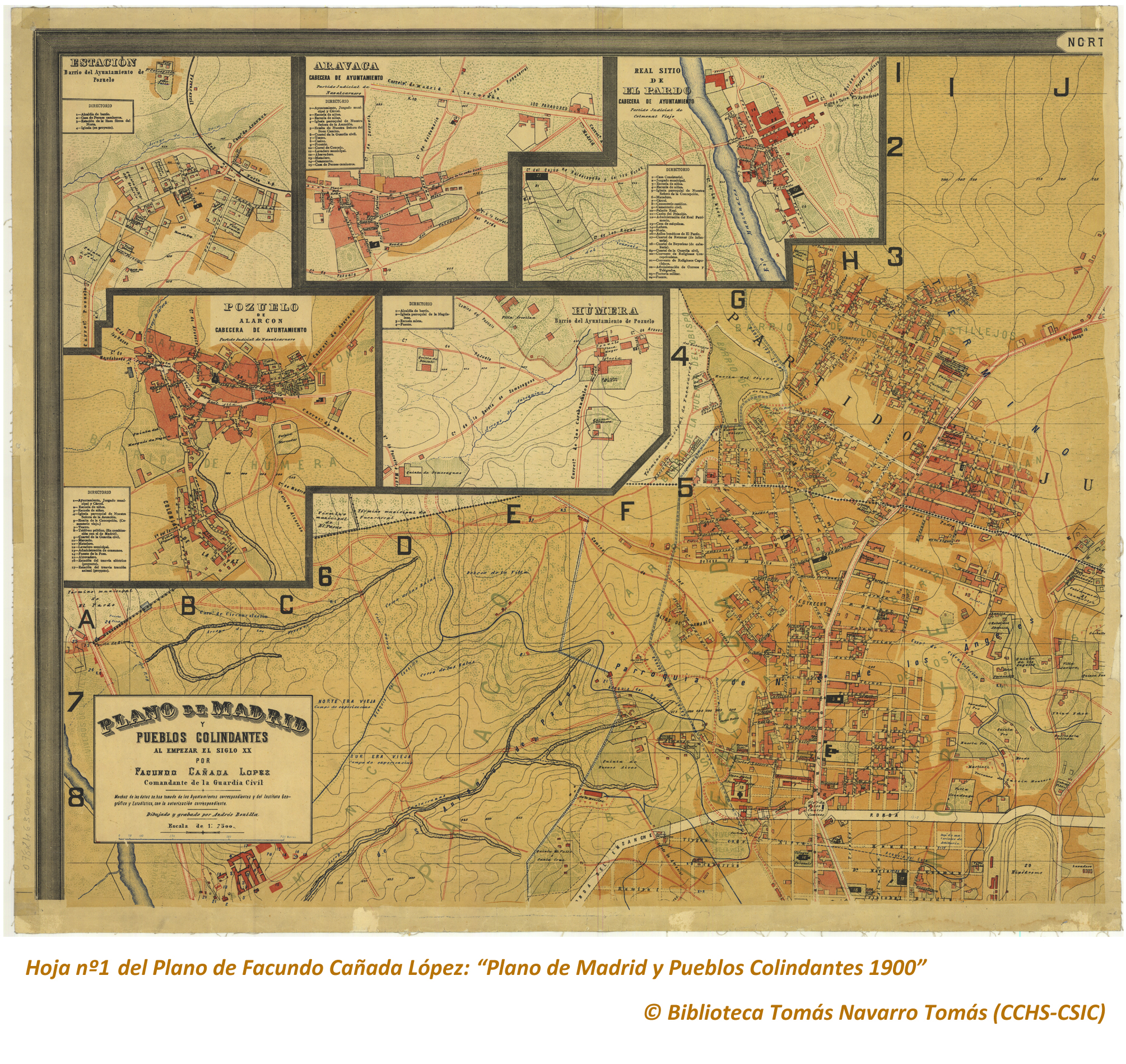 Hoja 1 del Plano de Madrid en 1900, dibujado por Facundo Cañada. Descripción física del plano total por el autor: "El plano consta de 6 hojas, cada una de las cuales mide 59 cm de altura por 72 cm de ancho (de trabajo, por supuesto, nada de anchos de cenefas), y, por lo tanto, al unirlas forman un plano que mide 1,44 metros de ancho y 1,77 de alto y las márgenes en blanco: se está tirando escrupulosamente en ocho colores y en superior papel, hallándose perfectamente grabado" (Facundo Cañada López, 1900). Descripción cartográfica del plato total: Plano de Madrid y Pueblos colindantes de Aravaca, Canillas, Canillejas, Carabanchel Alto, Carabanchel Bajo, Chamartín, El Pardo (Real Sitio), Fuencarral, Getafe, Hortaleza, Leganés, Pozuelo de Alarcón, con sus barrios de Húmera y Estación; Vallecas, Vicálvaro, Villaverde, etc, al principiar el siglo XX. El plano va acompañado de una Guía, con el Directorio de Madrid y otras notas aclaratorias. Información estadística y nomenclator del plano por el autor: La superficie del término municipal de Madrid de la época es de 821.189.581 pies cuadrados, equivalentes a 18.621 fanegas del marco de Madrid o sean 6475 hectáreas y 54 áreas; resultando de dicha superficie una proporción de 120,52 metros cuadrados por habitante, pues estos son 528.984, según el último empadronamiento general verificado en 1º de Diciembre de 1900. En el plano se fijan los nombres de las plazas, calles, callejones, cuestas, etc., que en la actualidad tienen, detallándose la numeración que a cada casa corresponde, dentro de cada manzana, pues se fijan los primeros y últimos números de cada una de éstas al principiar las calles, y después los últimos en las manzanas sucesivas, y de esta manera resulta toda la numeración de cada calle.